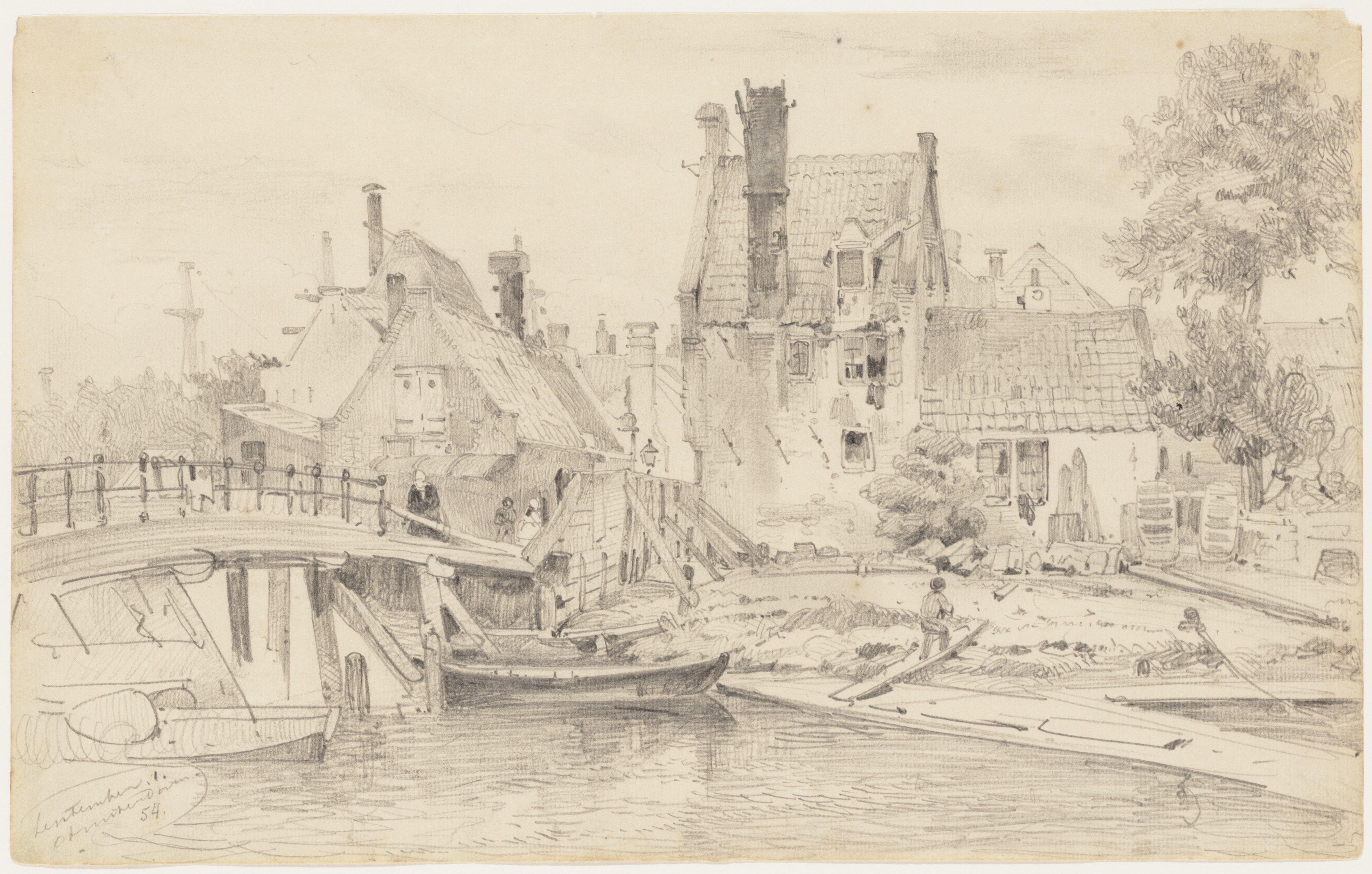 Beschrijving Zoutkeetsgracht Gezicht op Karseboomsbrug en Vierwindendwarsstraat. Documenttype tekening Vervaardiger Deventer, W.A. van Collectie Collectie Koninklijk Oudheidkundig Genootschap Datering 1854 Geografische naam Zoutkeetsgracht Inventarissen Afbeeldingsbestand KOG-AA-2-19-359